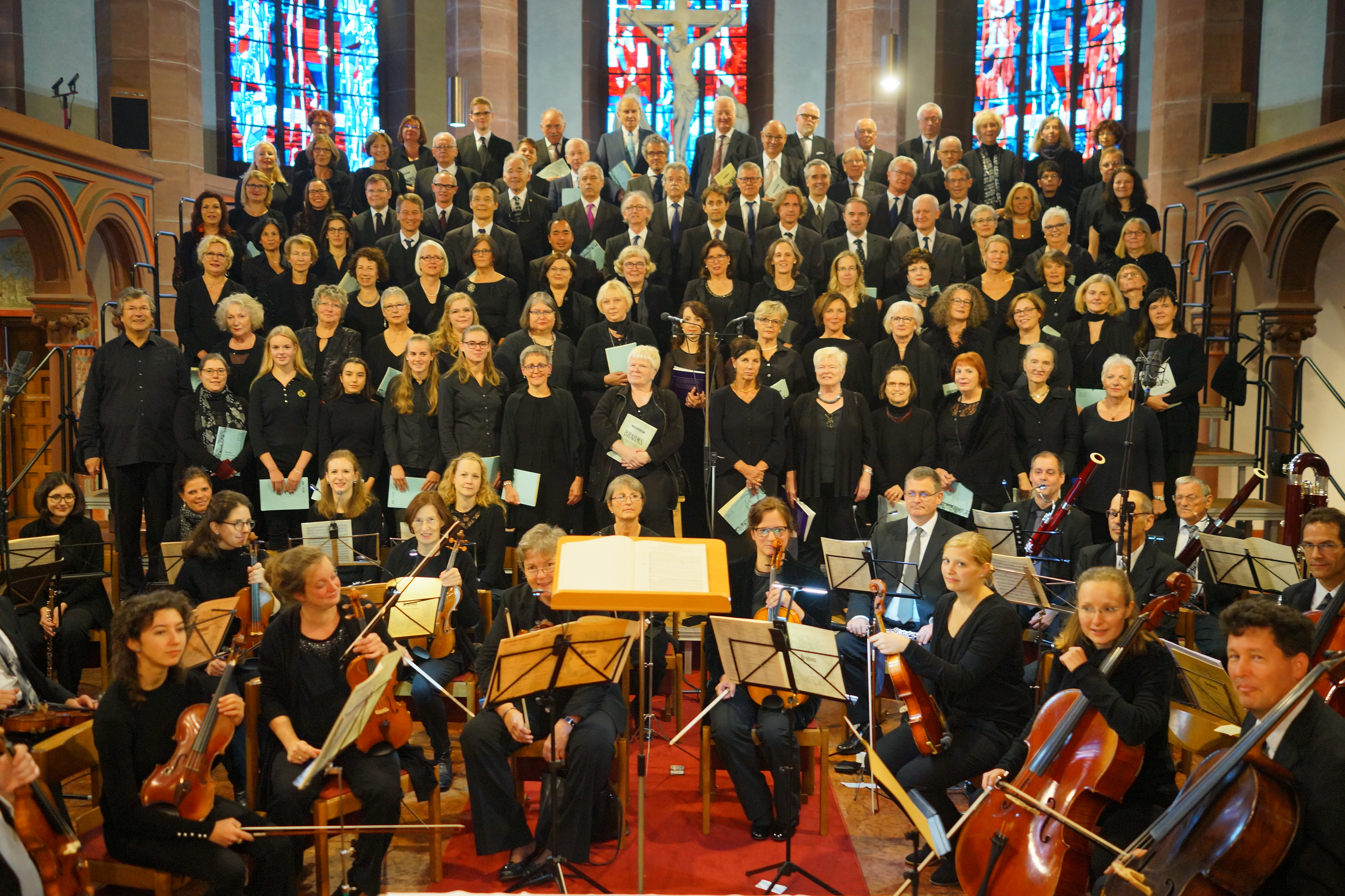 vor dem Konzert mit dem "Deutschen Requiem" von Johannes Brahms in St. Bonifatius, Wiesbaden